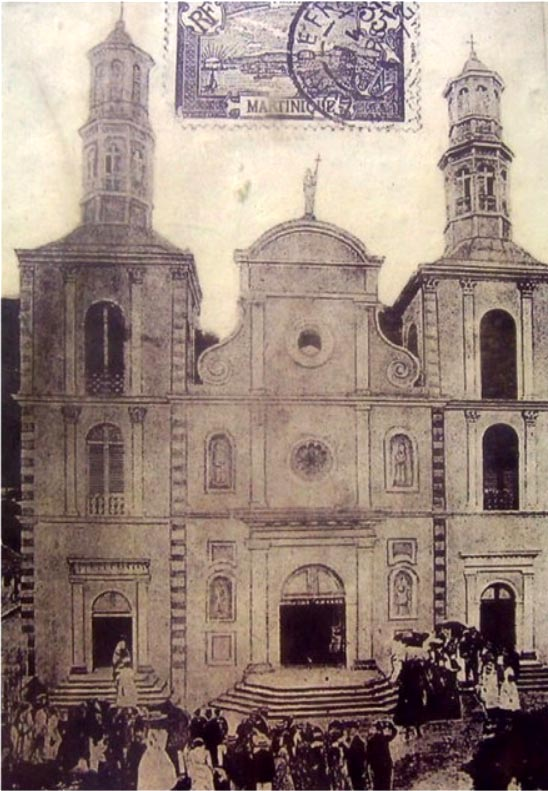 Façade de la cathédrale Notre-Dame-du-Bon-Port de Saint-Pierre de la Martinique.